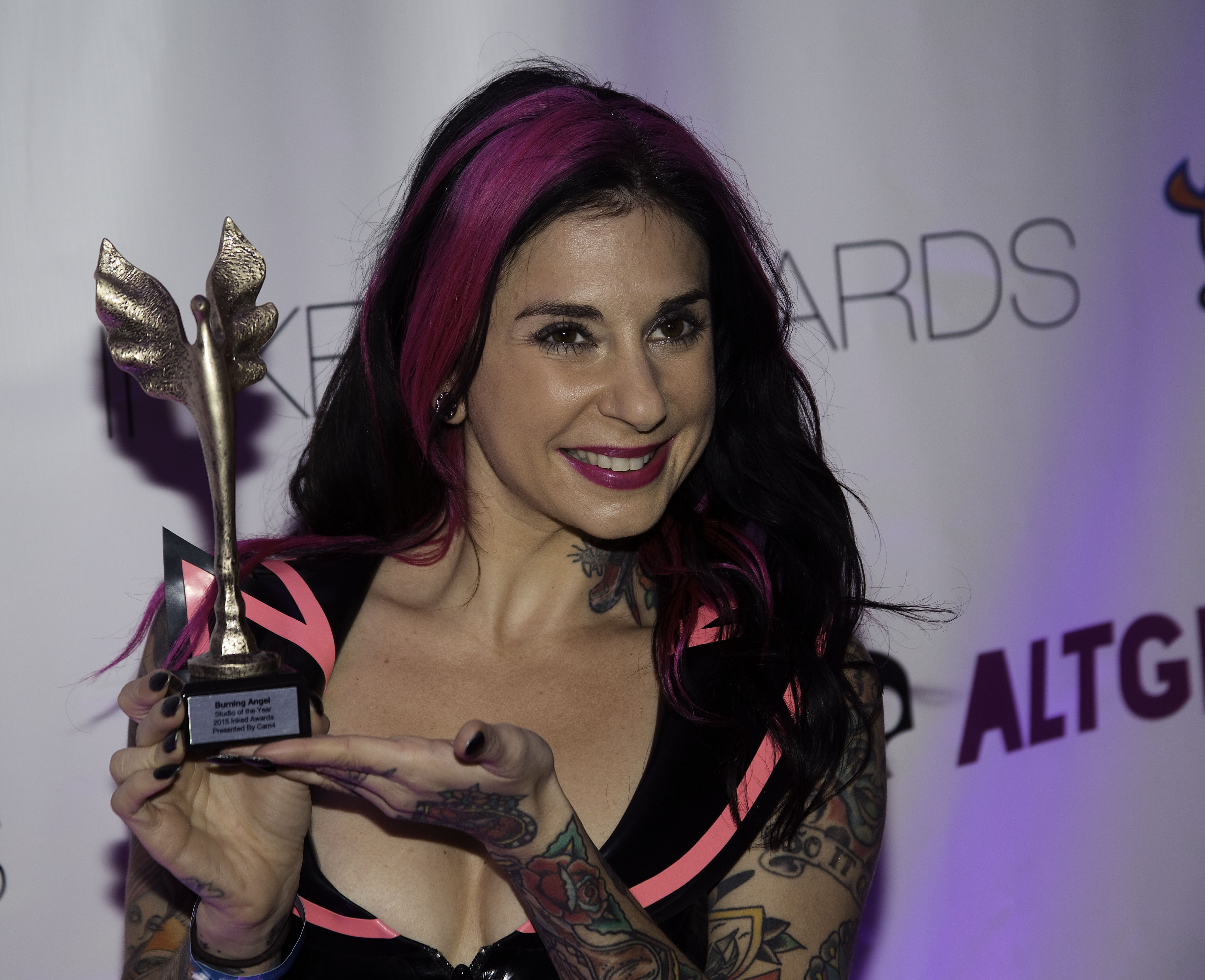 EX15_0392bas